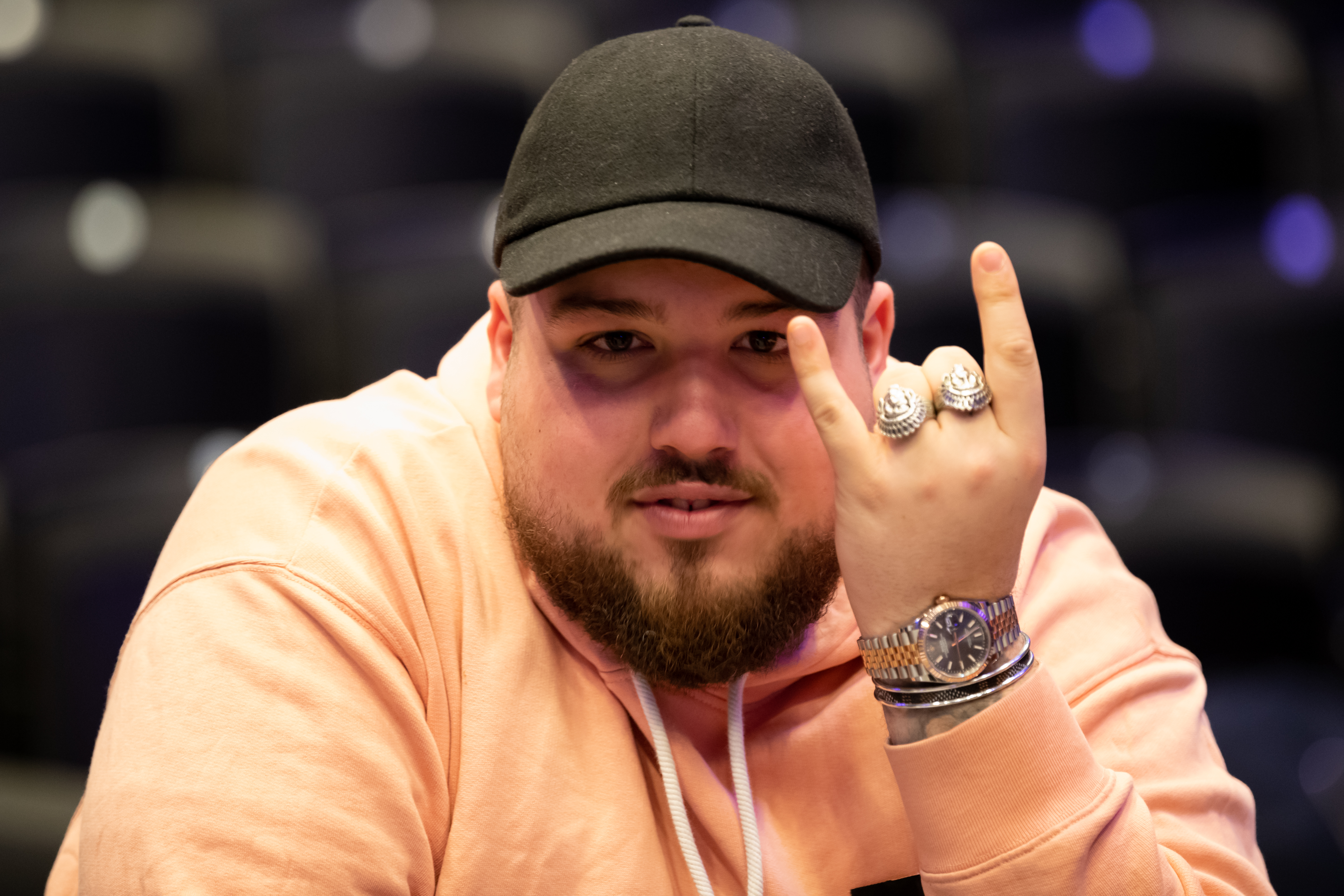 Anis don Demina på pressträff inför andra chansen. Melodifestivalen 2020, Eskilstuna.